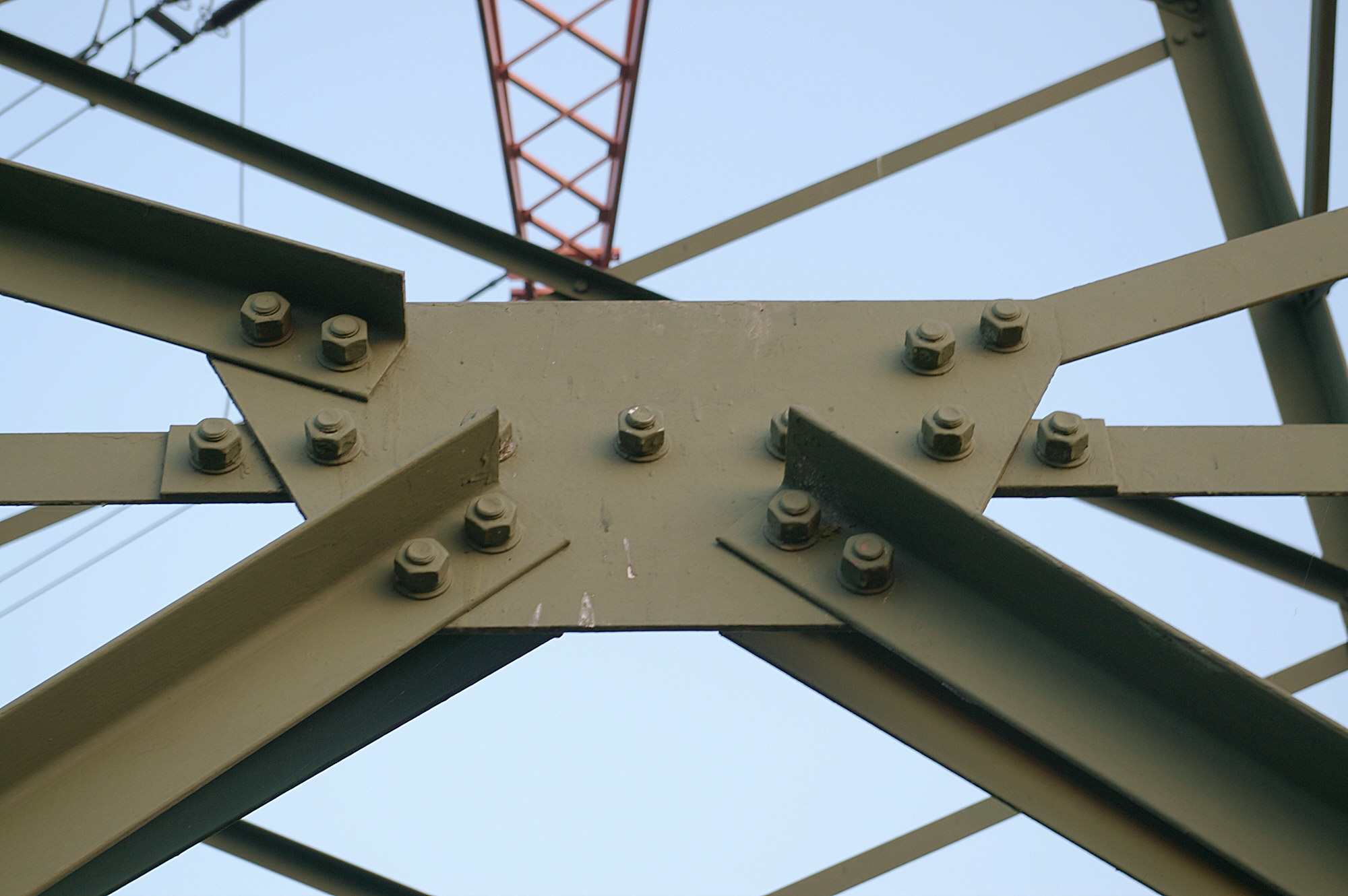 Knotenblech in der Konstruktion eines Hochspannungsmastes